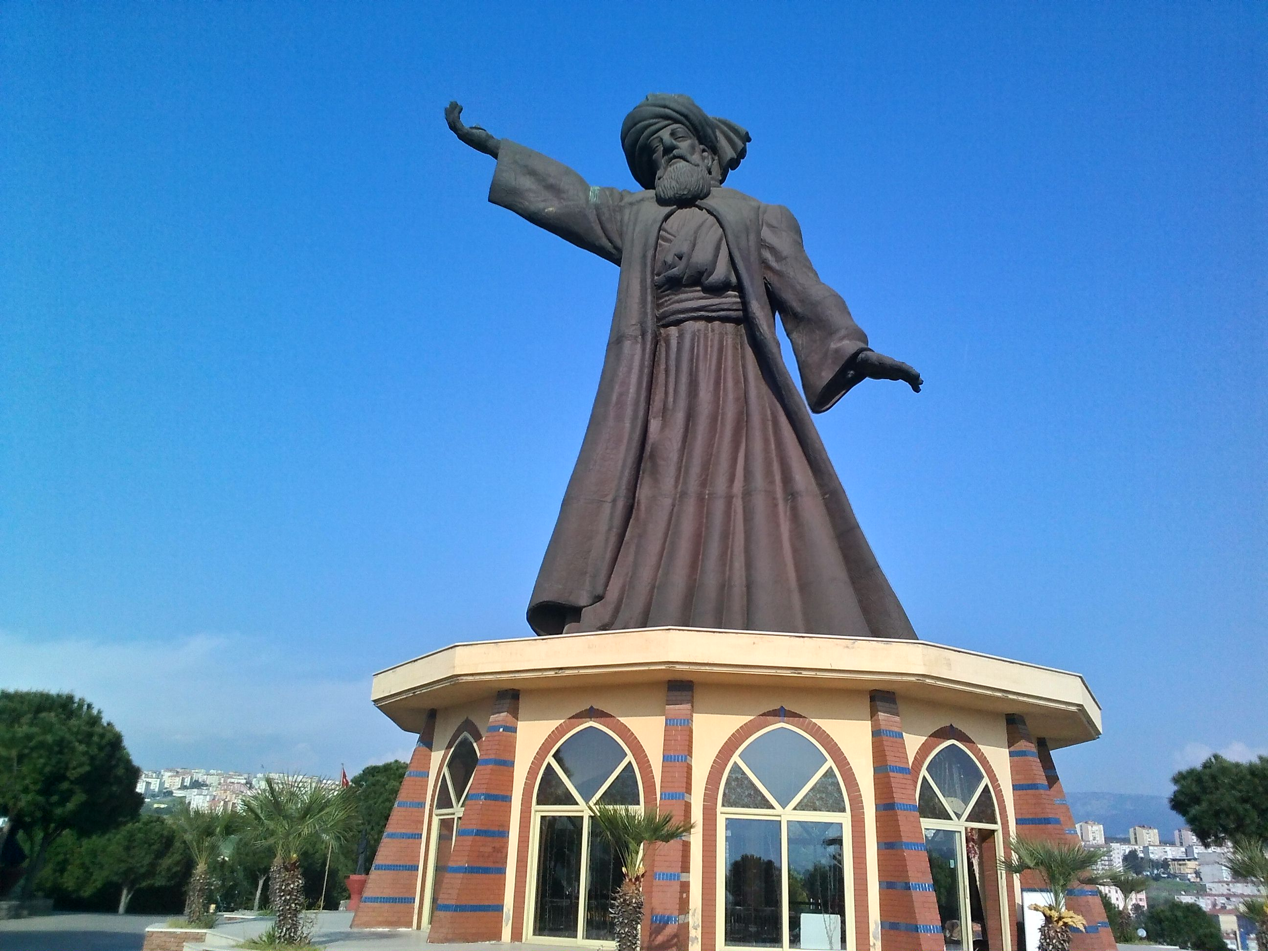 İzmir ili Buca ilçesinde bulunan Mevlana heykeli ve mesire alanına ait, kendi çektiğim bir görüntü.